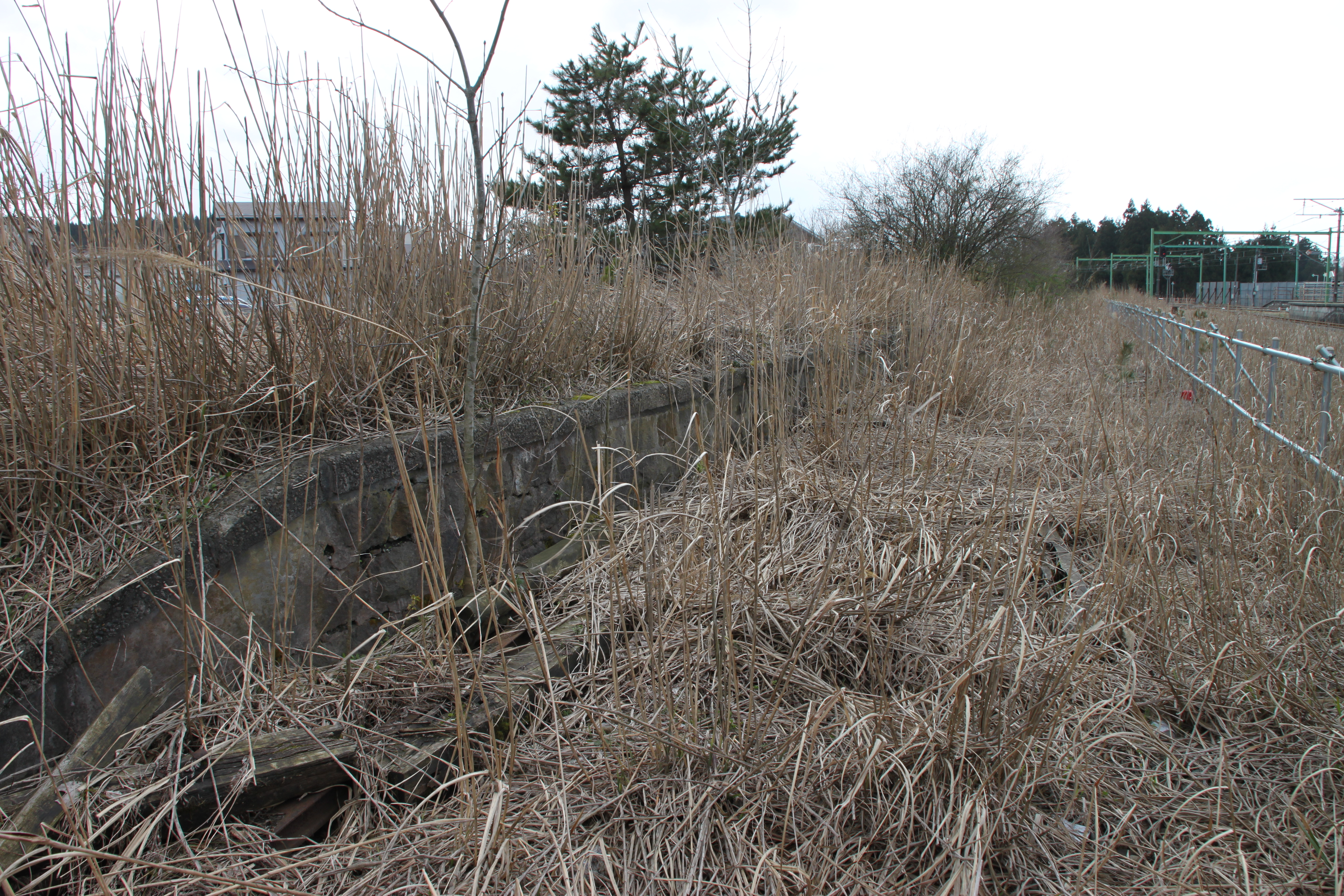 長岡鉄道大河津駅跡。ホームが残るが、早春以外は草に埋もれて見えない。